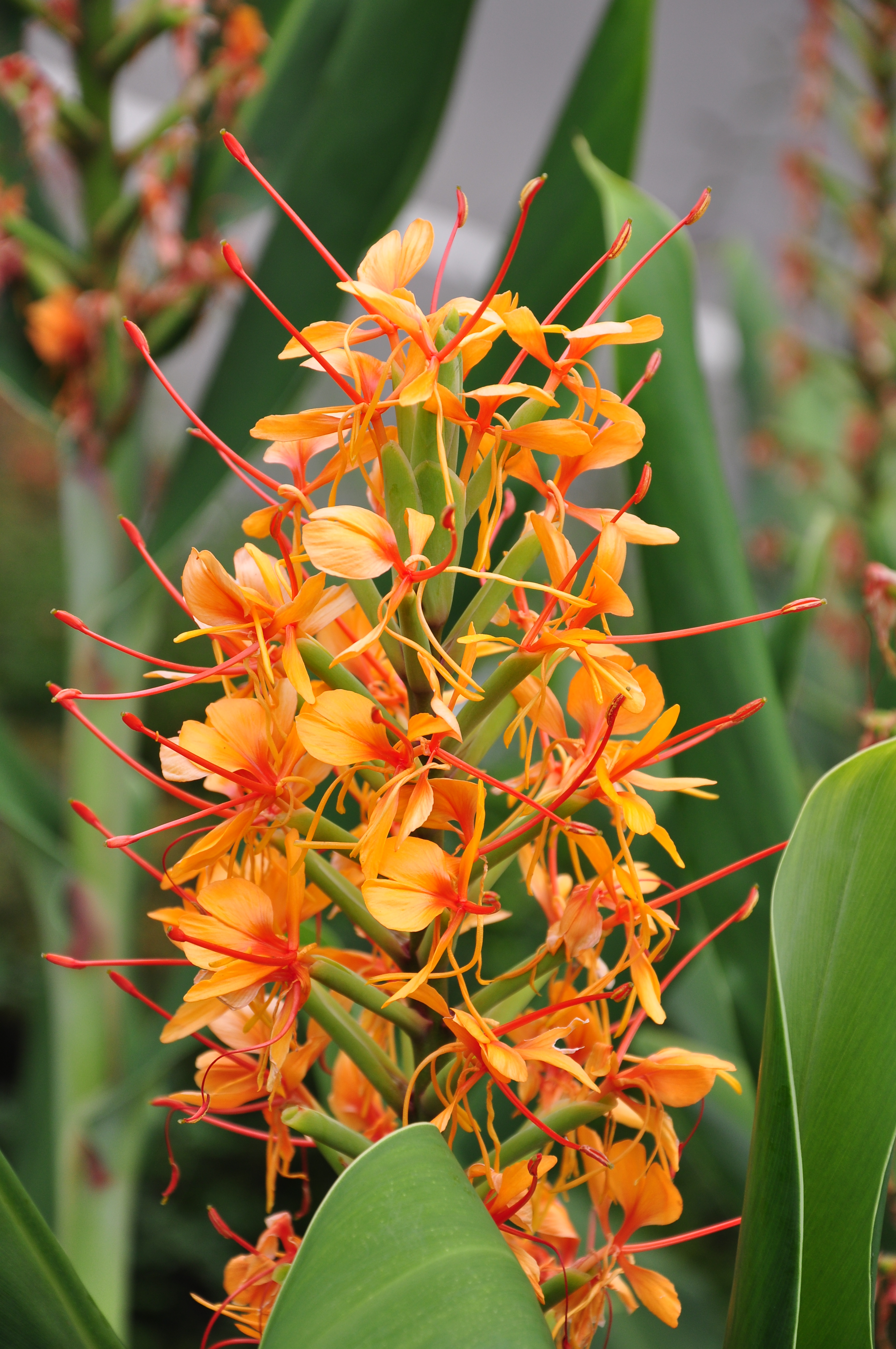 Botanischer Garten der Universität Zürich in Zürich-Weinegg (Switzerland) : [Hedychium coccineum] var. aurantiacum 'Tara'